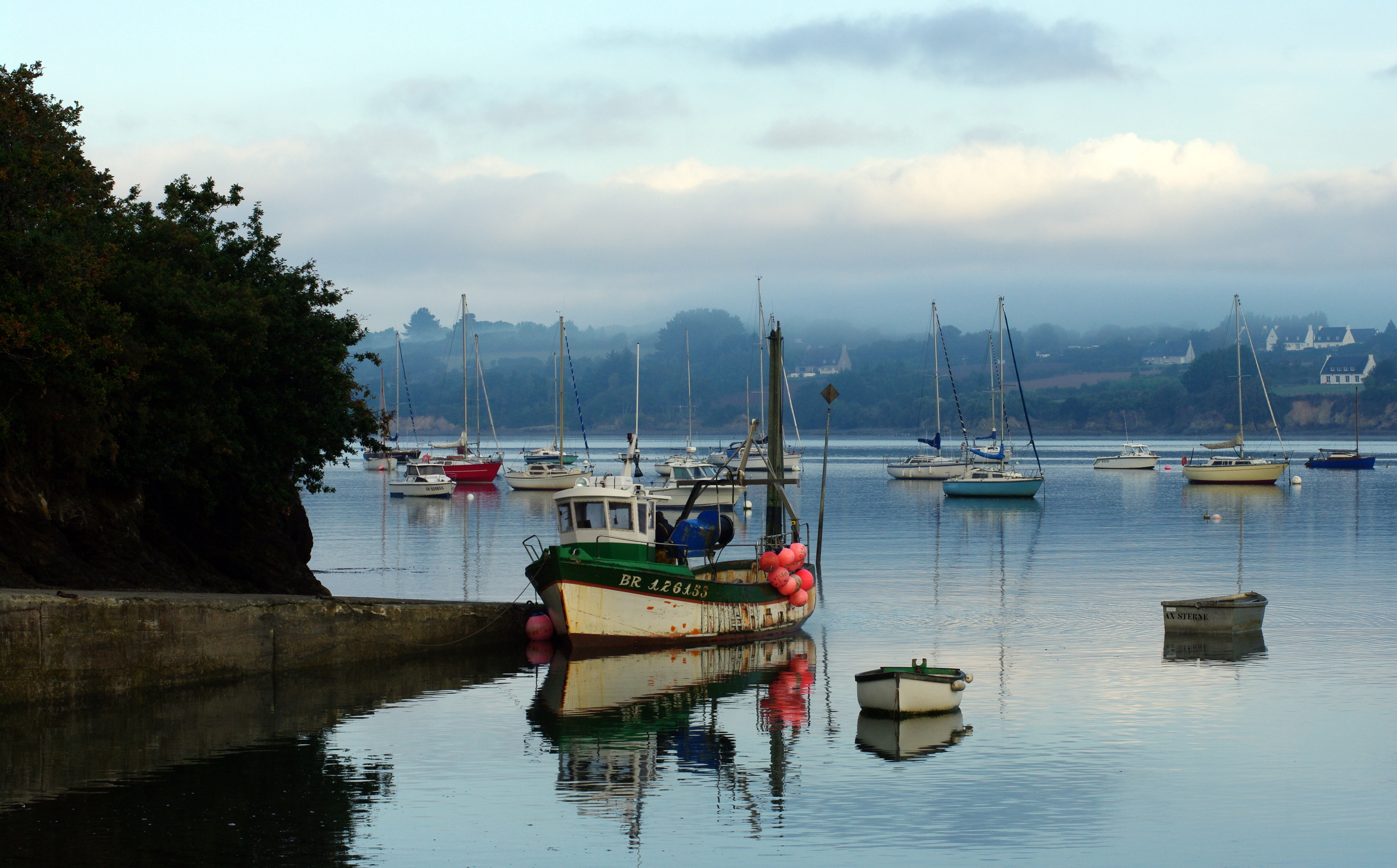 Logonna-Daoulas, Pors-Beac'h au petit matin.JPG